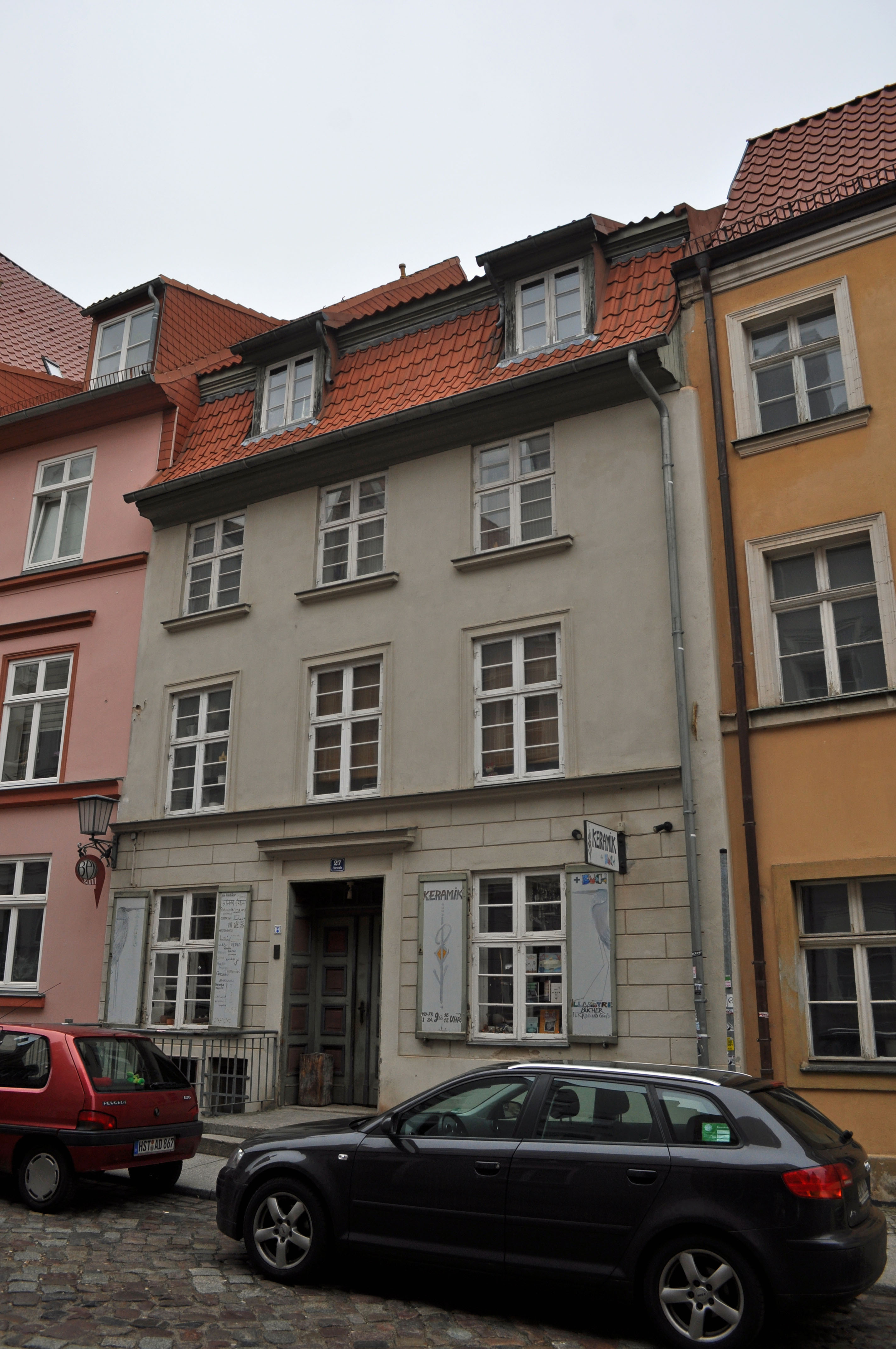 Gebäude bzw. Gebäudedetail in Stralsund. Straße und Hausnummer siehe Dateiname.